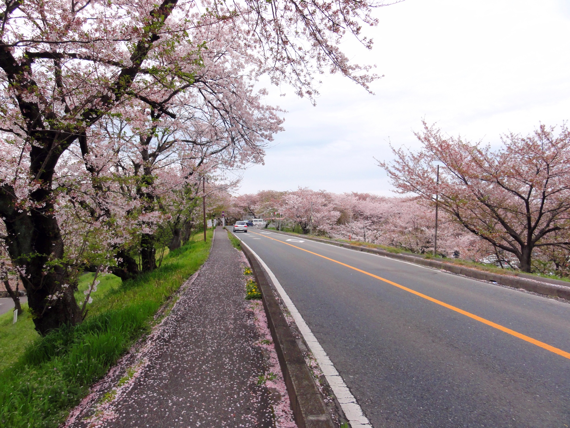 岐阜県羽島郡笠松町(桜並木)